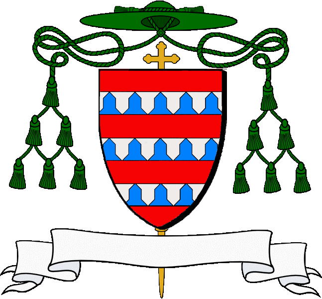 En gwad e deir dreustell brizhet etre arc'hant ha glazur